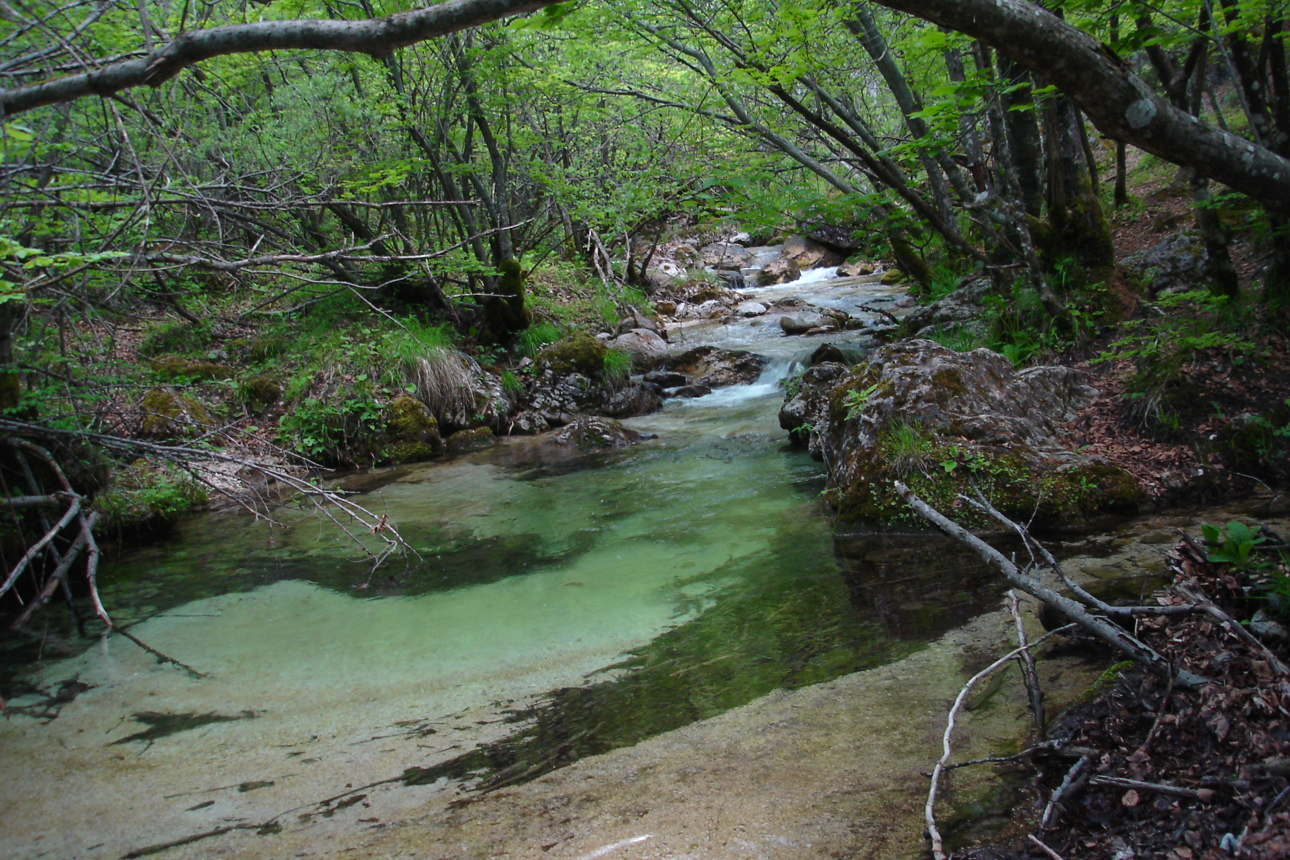 Torrente Scerto nel Parco Nazionale d'Abruzzo, fa venire il maldipancia la foto???